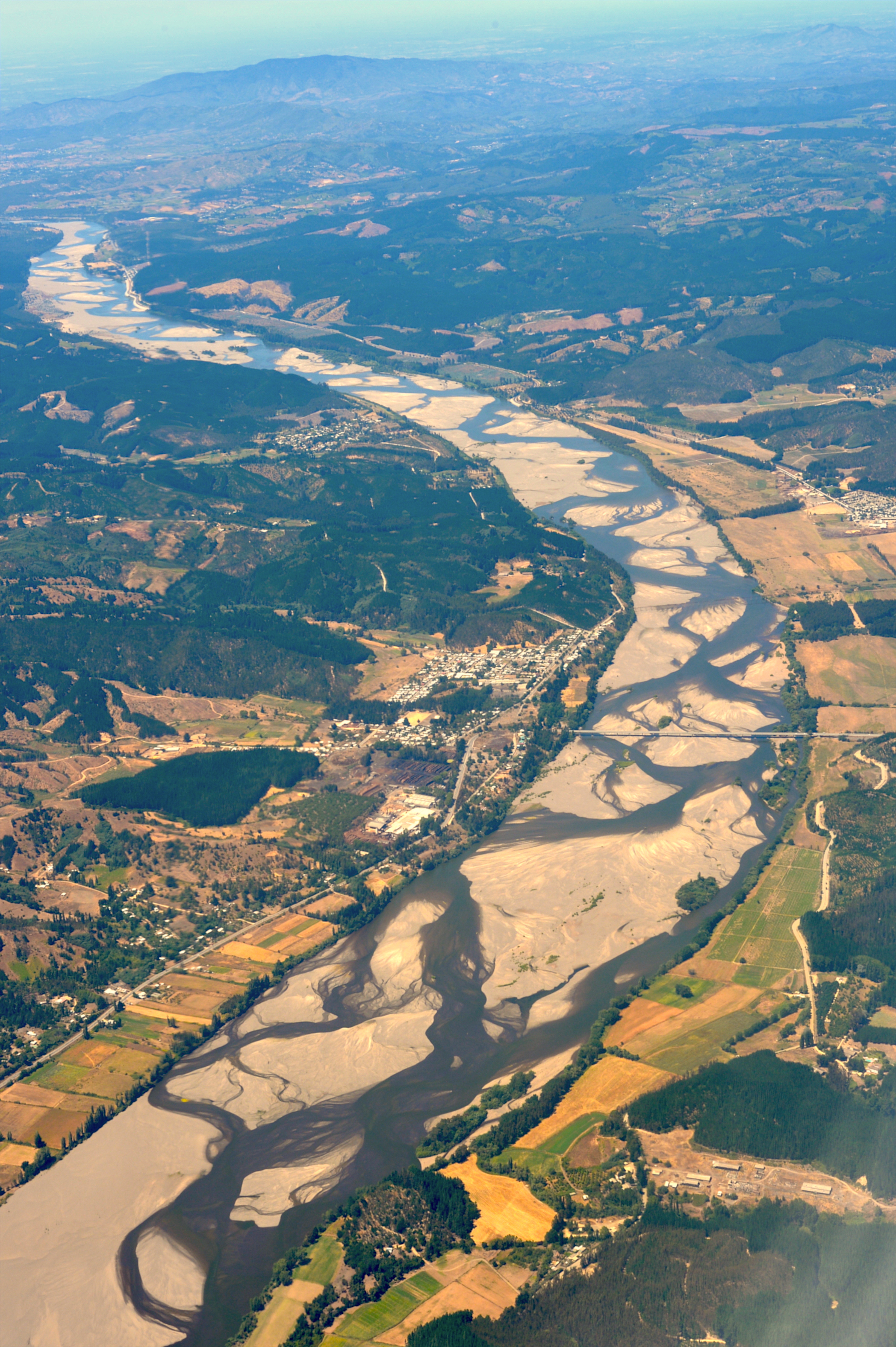 Itata river, Coelemu, Chile.